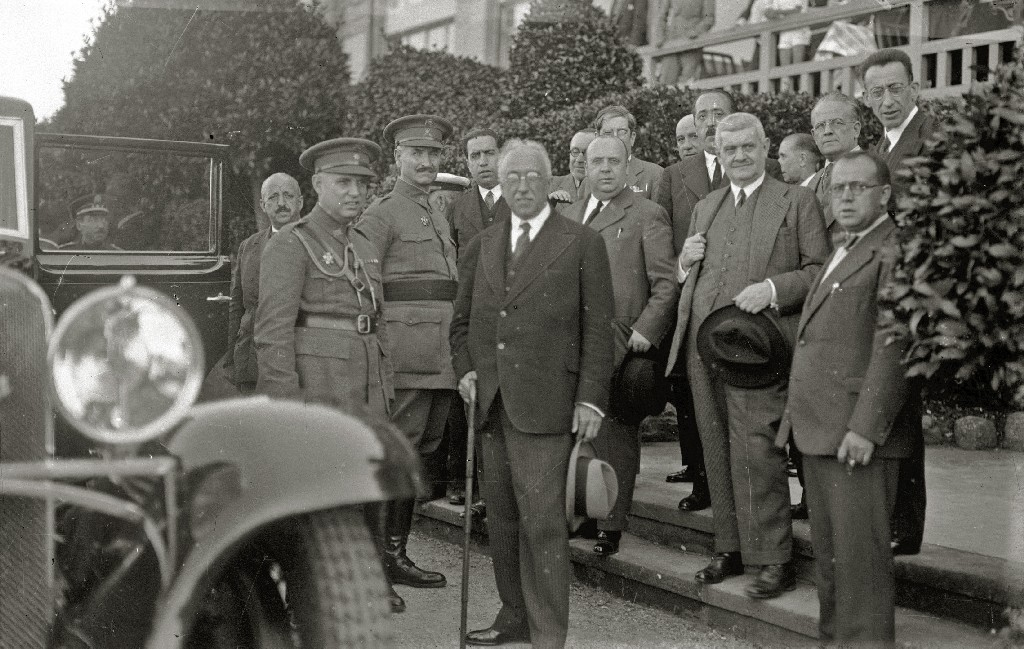 Título original: Visita de Niceto Alcalá Zamora a San Sebastián (16/21) Localización: San Sebastián (Guipúzcoa)